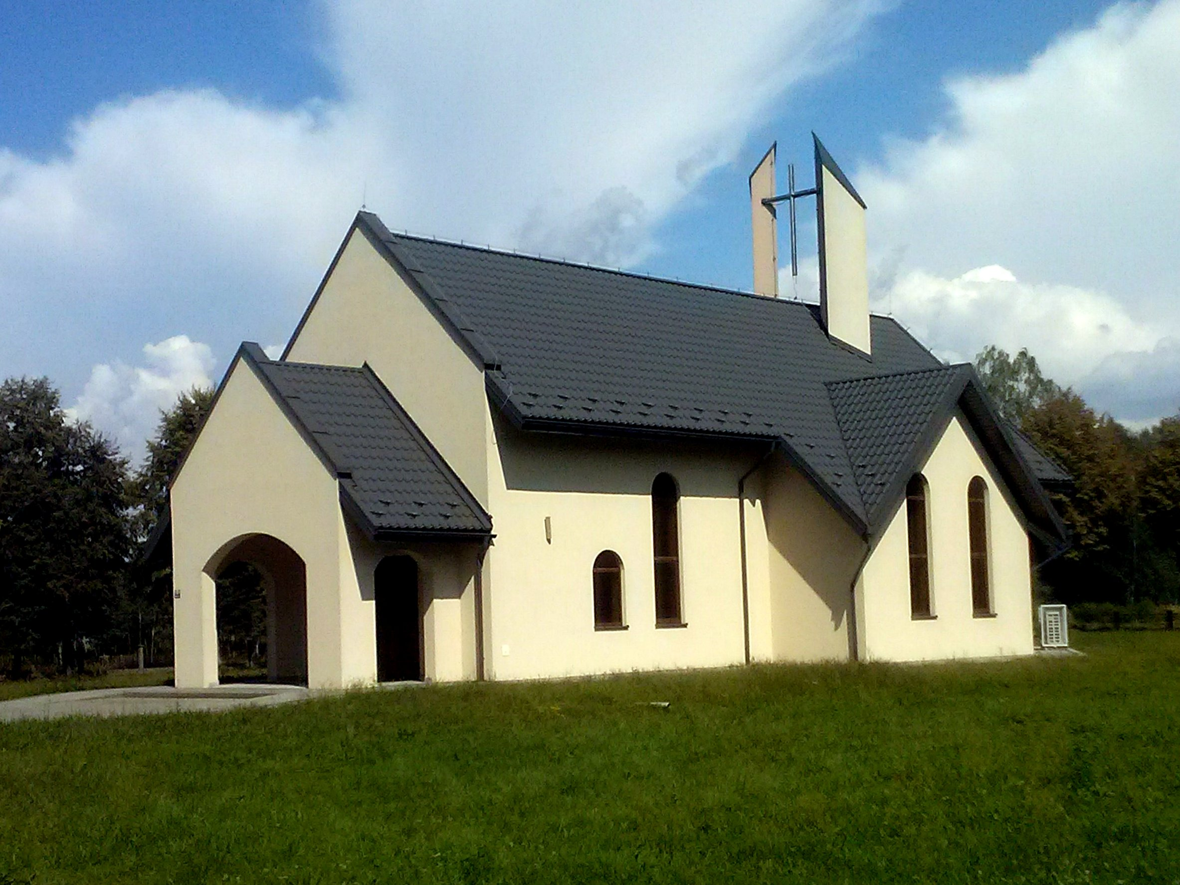 Kaplica przedpogrzebowa w Gniewczynie Łańcuckiej